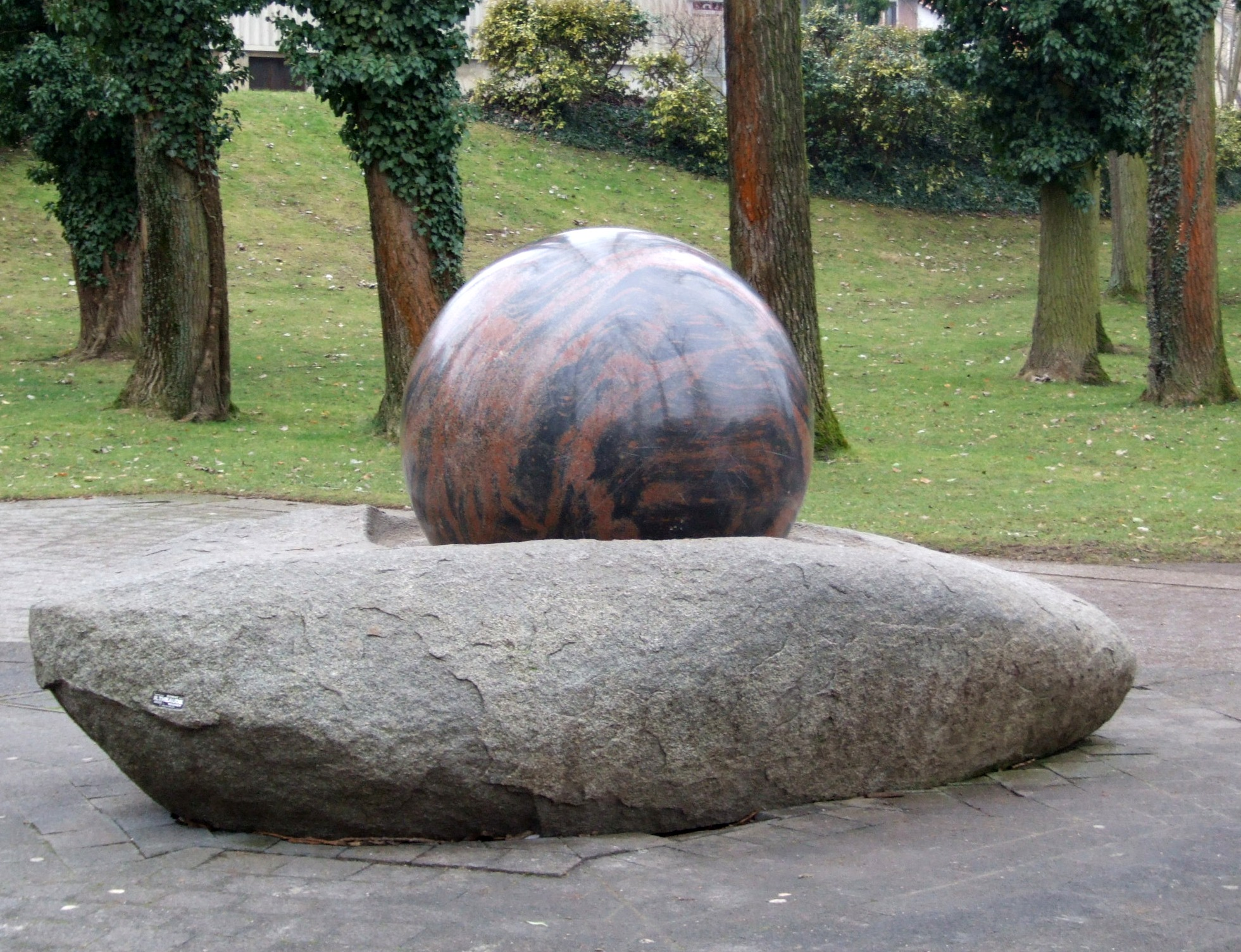 Fontaine Galilée, Parc scientifique du Près-la-Rose, Montbéliard, Doubs, Franche-Comté, FRANCE